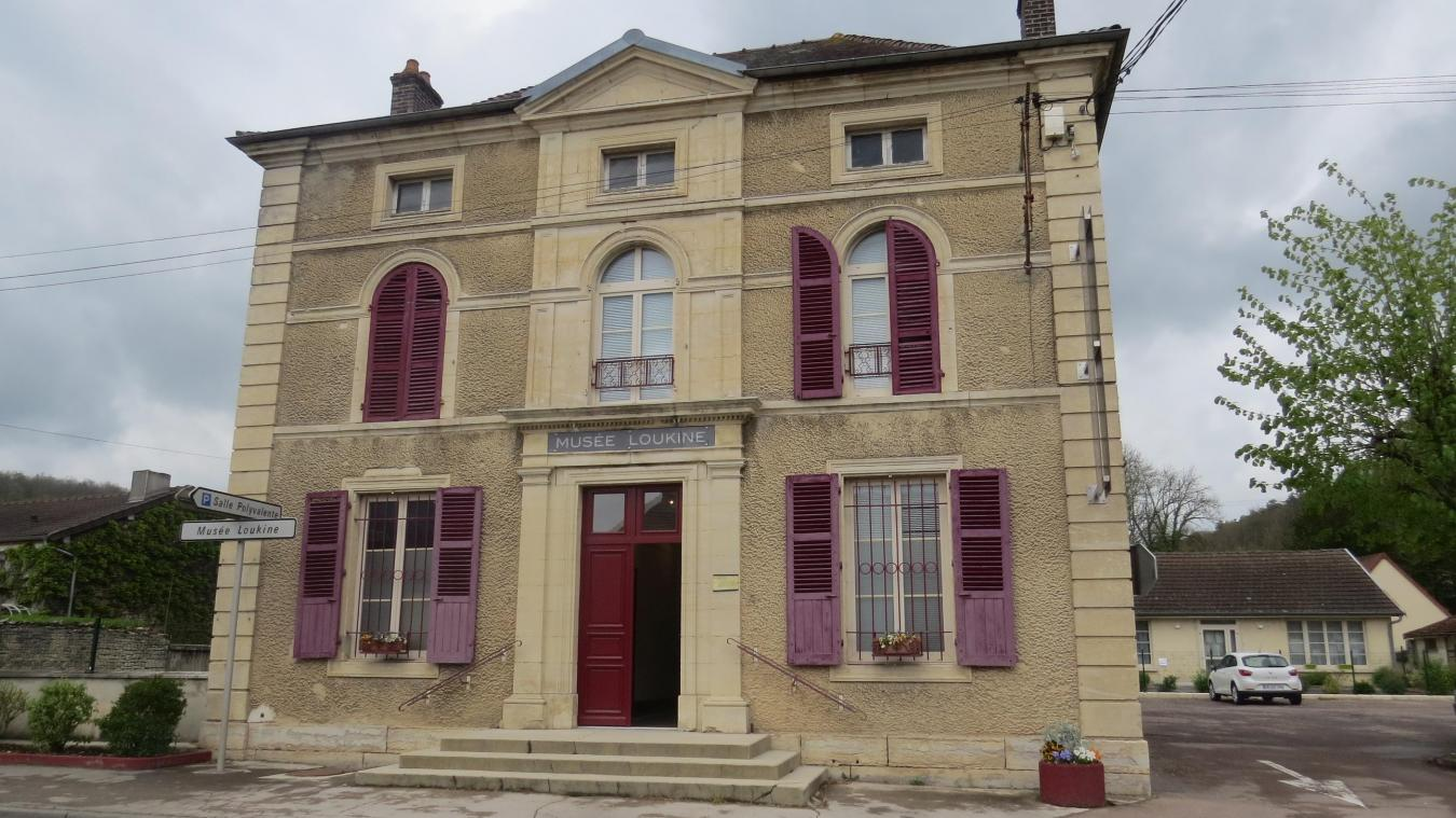 Photo du Musée Loukine à Arsonval